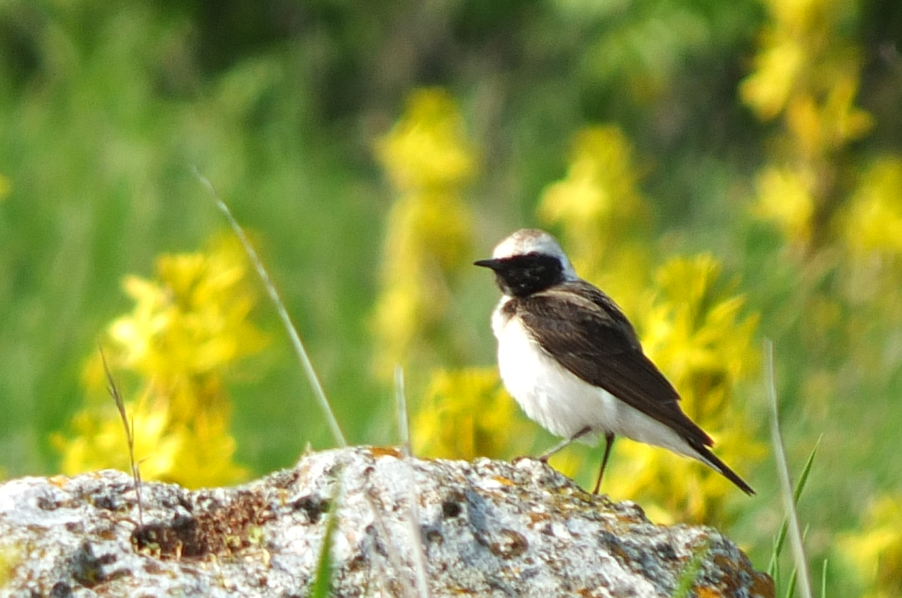 Калиакра, Черногърбо каменарче (Oenanthe pleschanka) на нос Калиакра